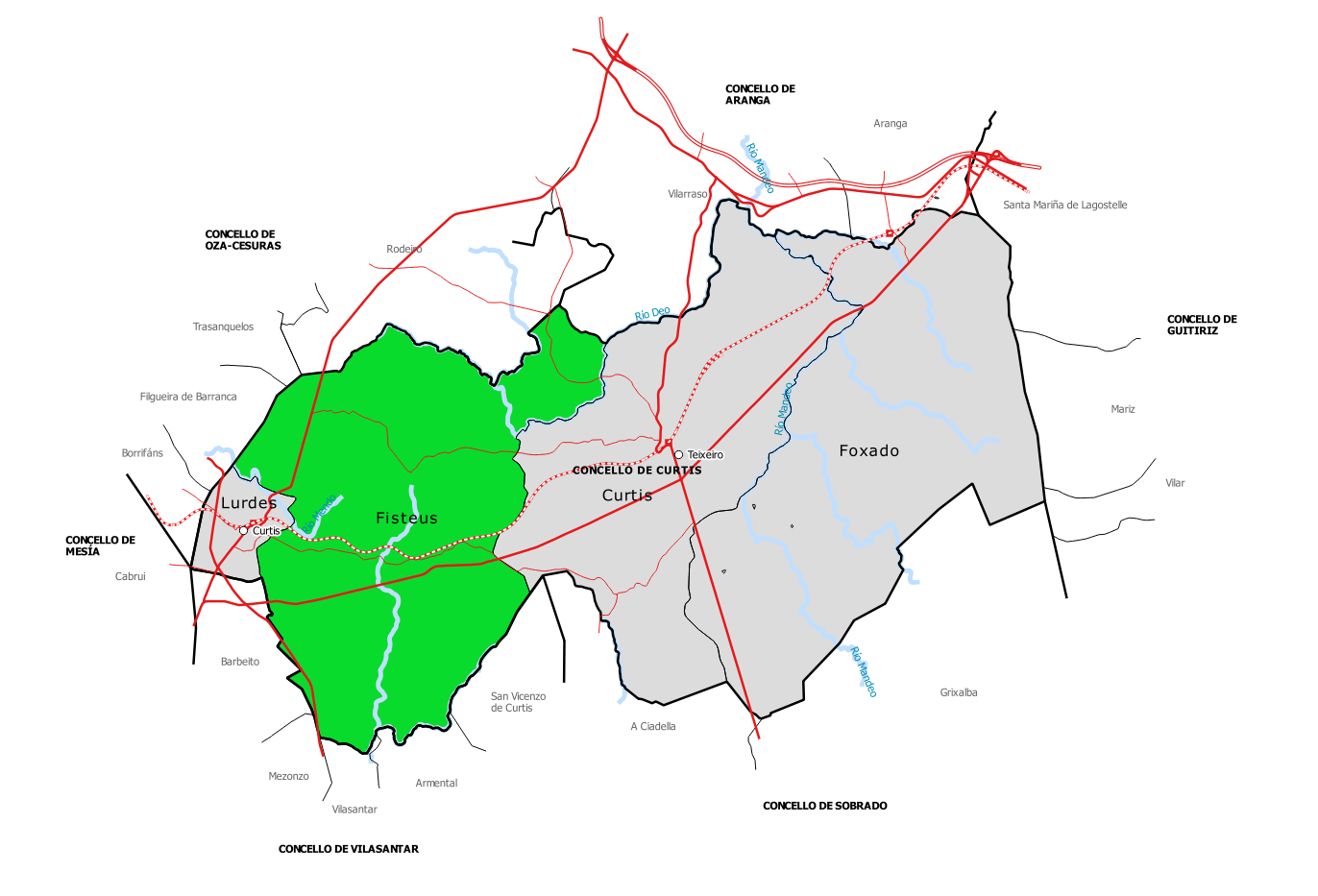 Mapa da parroquia de Fisteus no concello de Curtis.